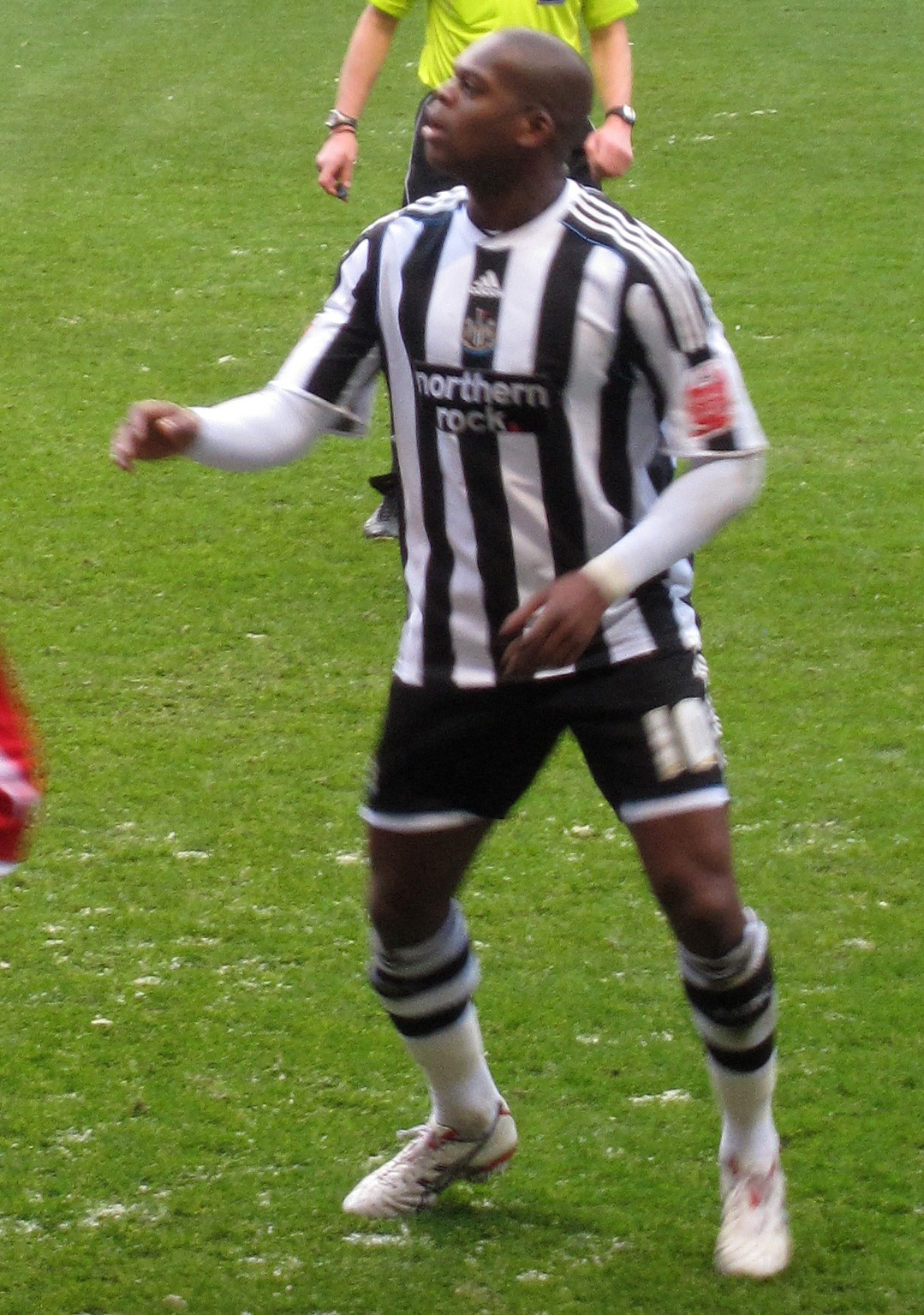 @st james' park, newcastle